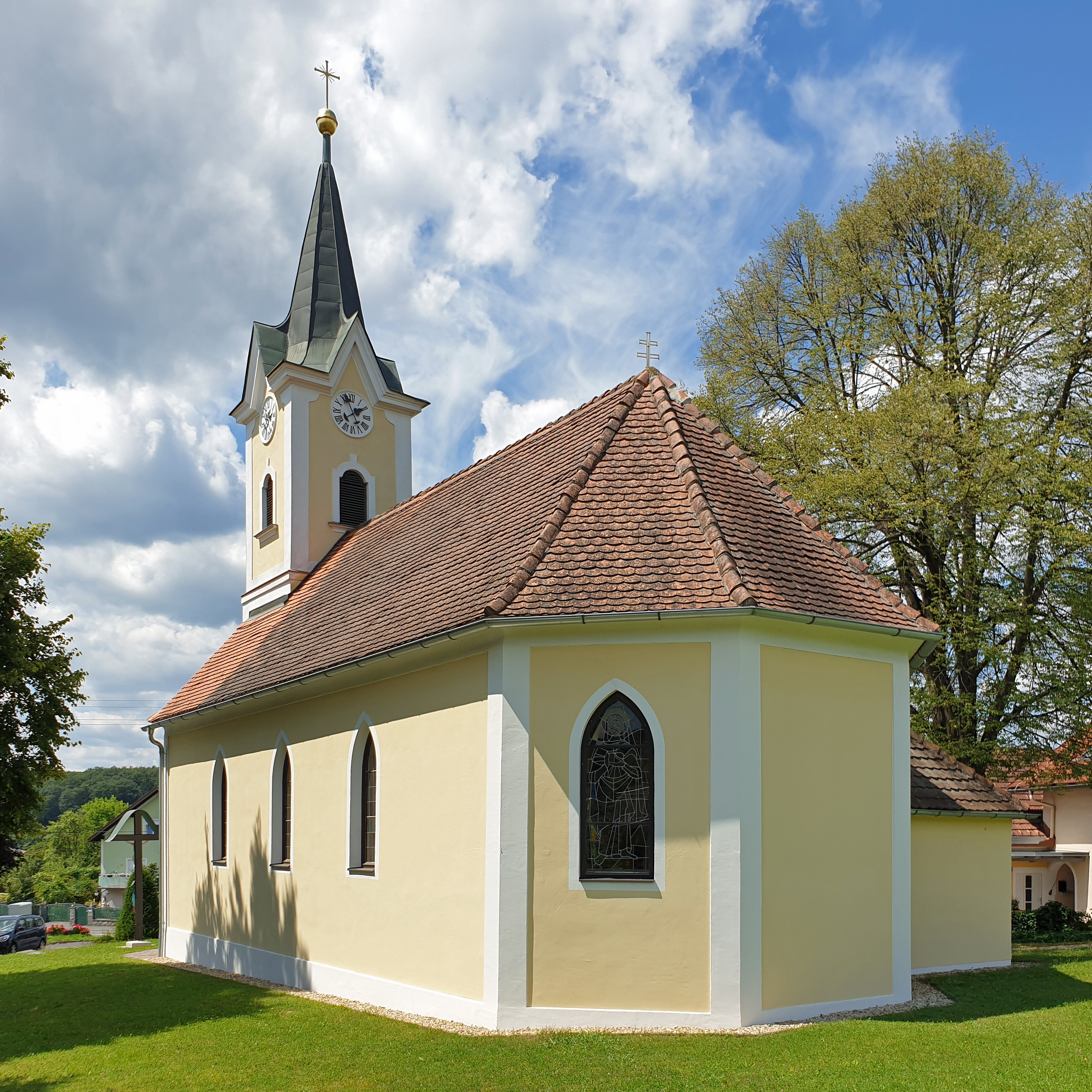 Ortskapelle hl. Johannes d. Täufer